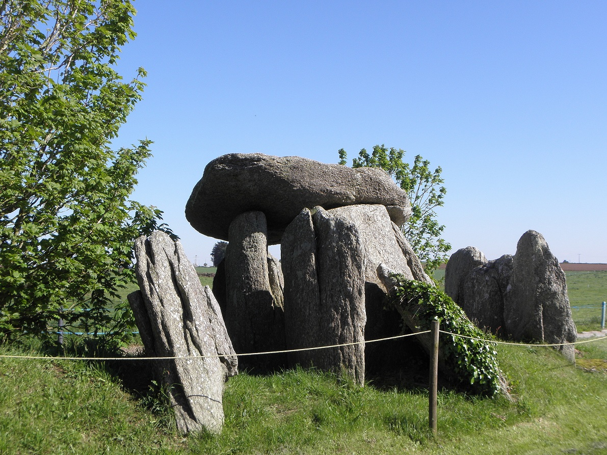 Dolmen de Tréguelc'hier ou du Cosquer à Goulven (29).